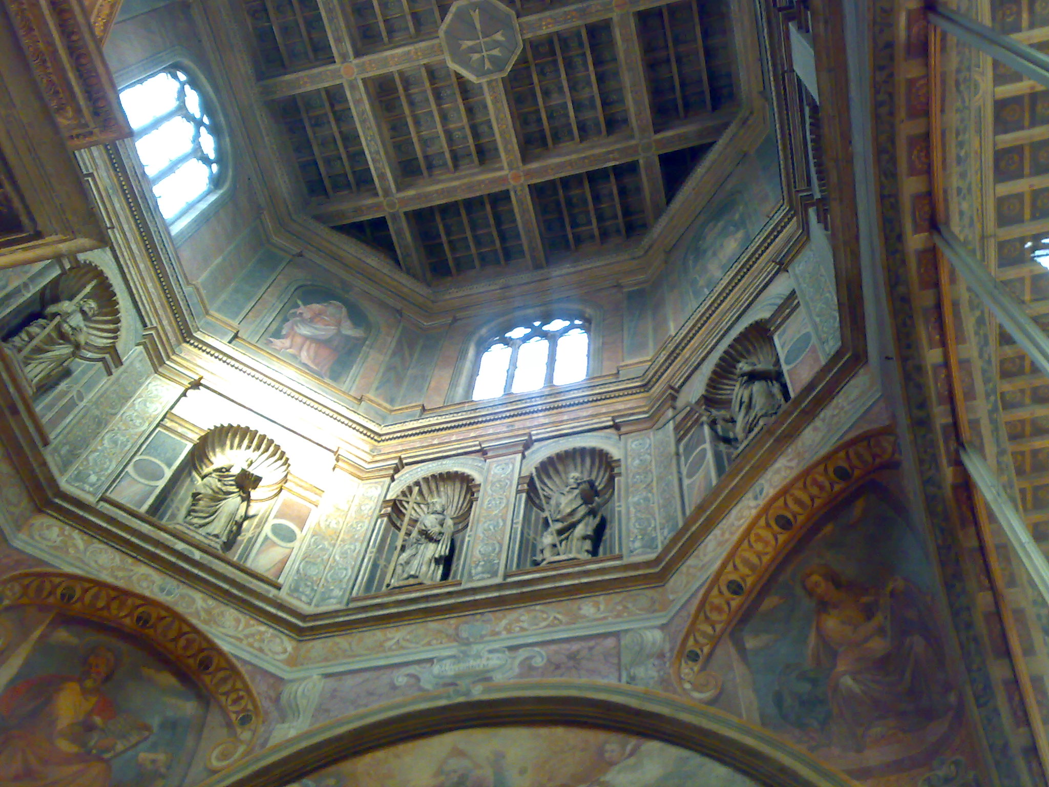 Arispedale Santo Spirito in Sassia Sec XV - Interno della torre ottagonale